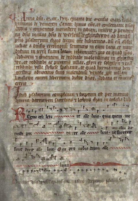 Psalterium cum antiphonis et hymnis", Stadtbibliothek Lübeck, Ms.theol.lat.2°4 , fol. 2 v, Kolophon + Regina caeli, laetare